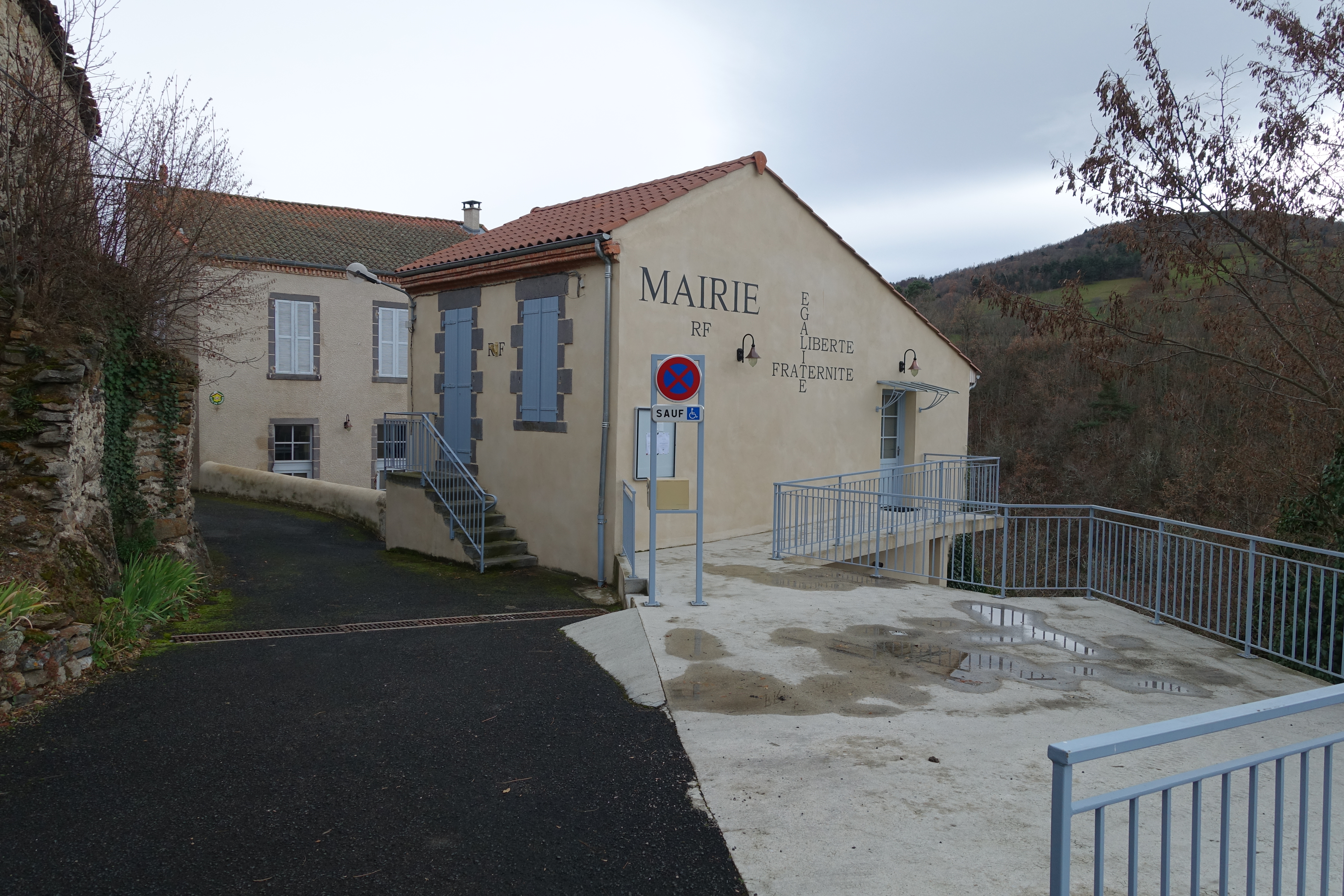 Mairie de Saint-Hérent